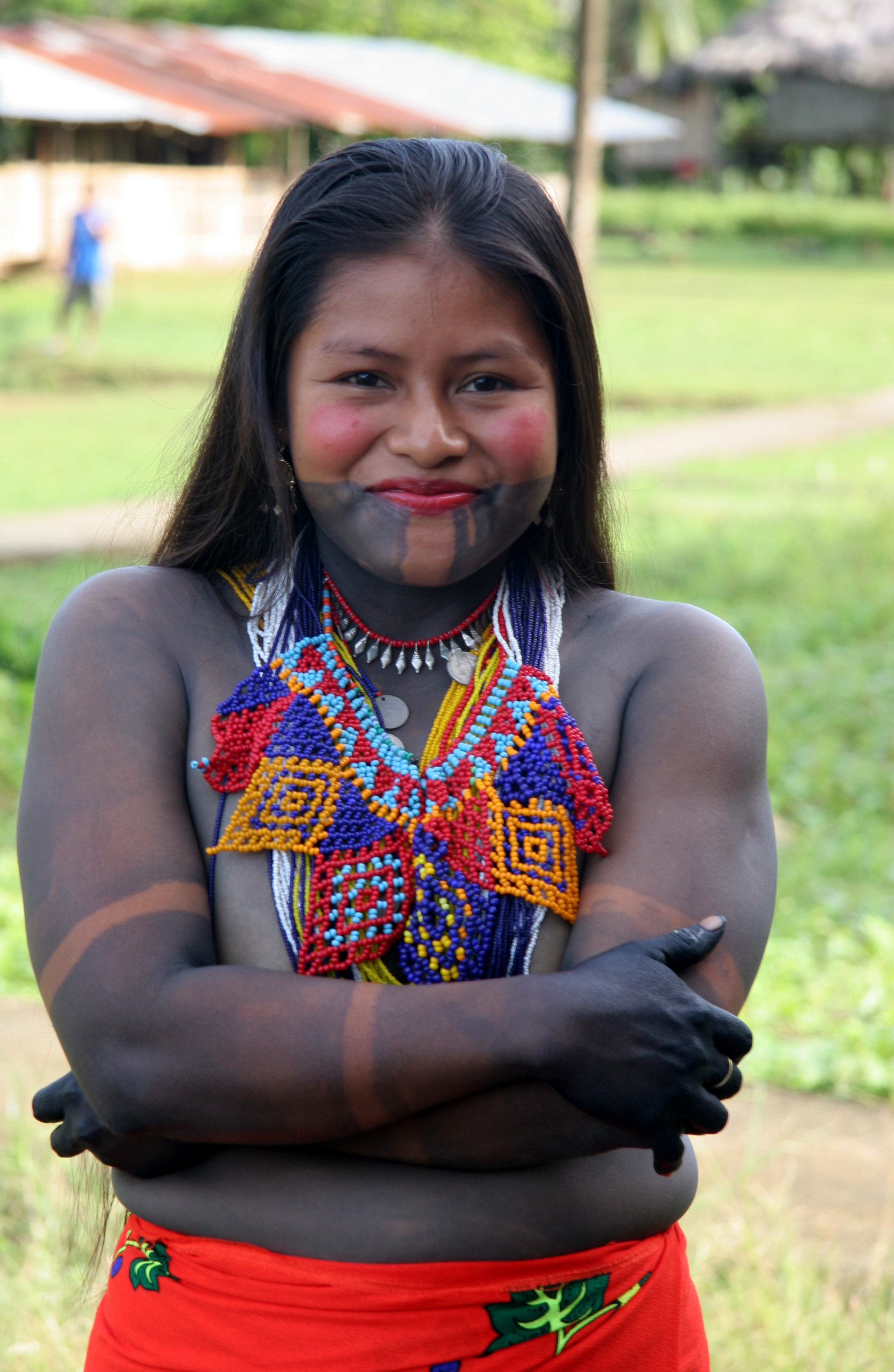 Panama, Darien, femme embera habillée pour la danse